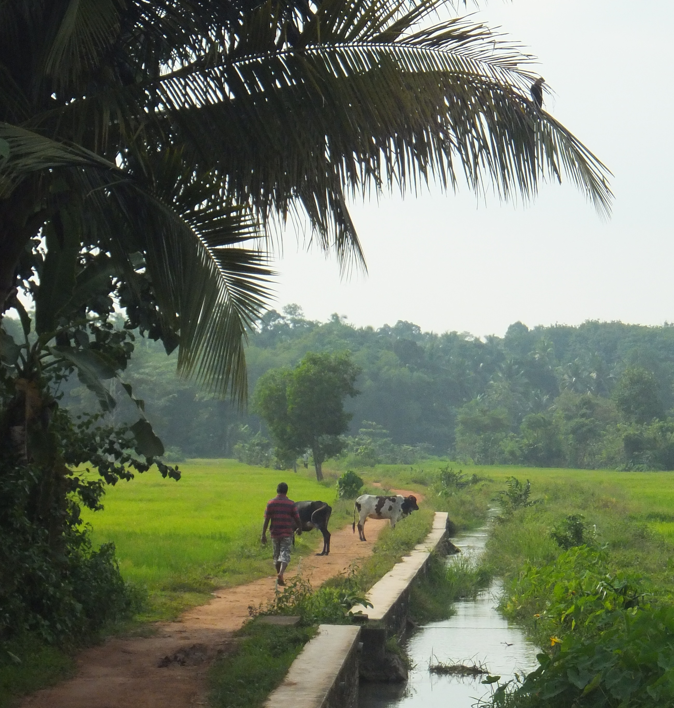 සිංහල: බැලුම්මහර පැරණි තැපැල් කණුව ඉදිරිපිට පාර ක්‍රි.ව. 2013දී